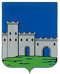 Гологори: Герб Гологори (XVIII ст.)